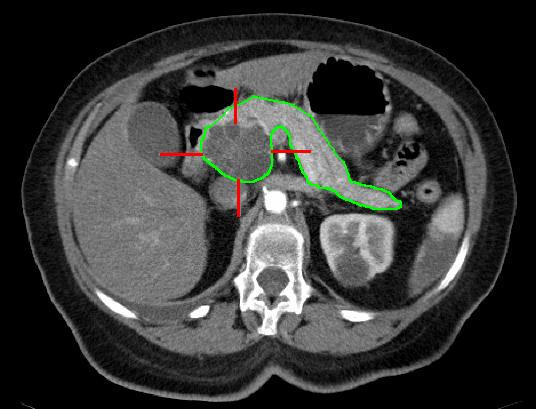 Zystisches Adenokarzinom (rot markiert) der Bauchspeicheldrüse (grün umrandet). Computertomographische Aufnahme mit Kontrastmittel